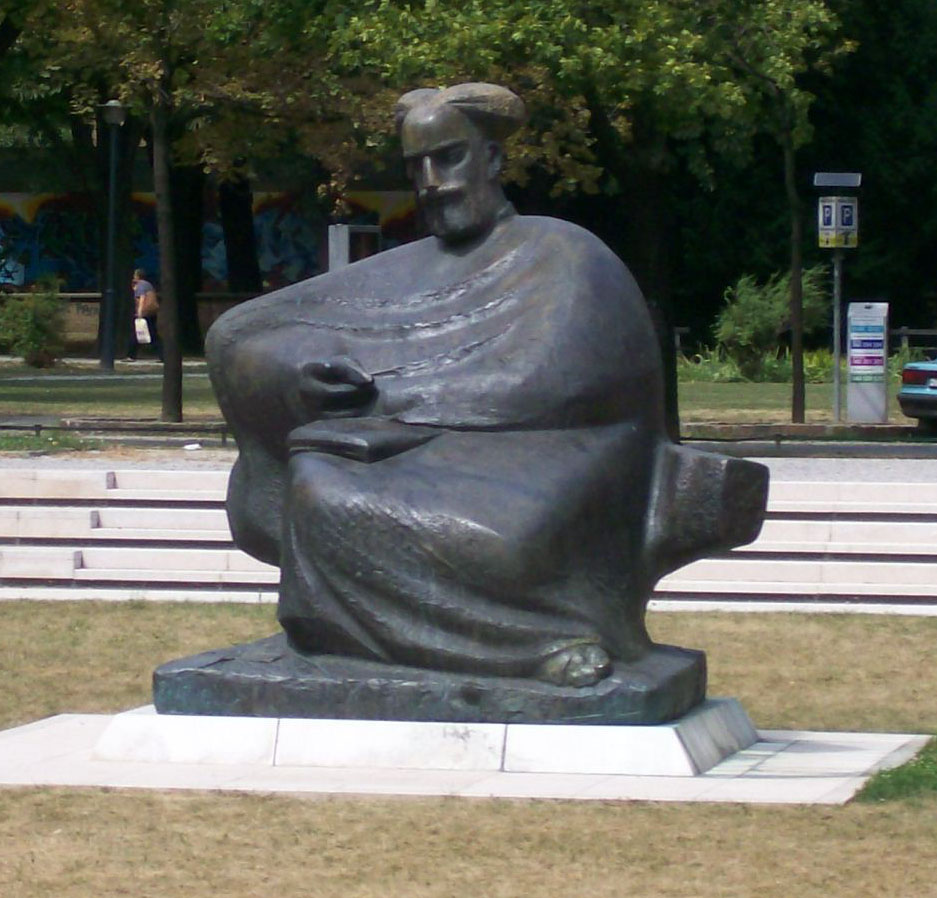 Spomenik Marku Maruliću u Zagrebu, ispred Hrvatskog državnog arhiva